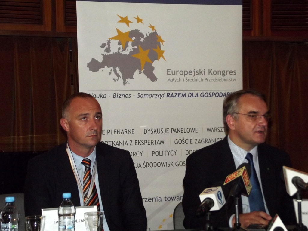 Zdjęcie zrobione podczas II Europejskiego Kongresu Małych i Średnich Przedsiębiorstw w Katowicach.